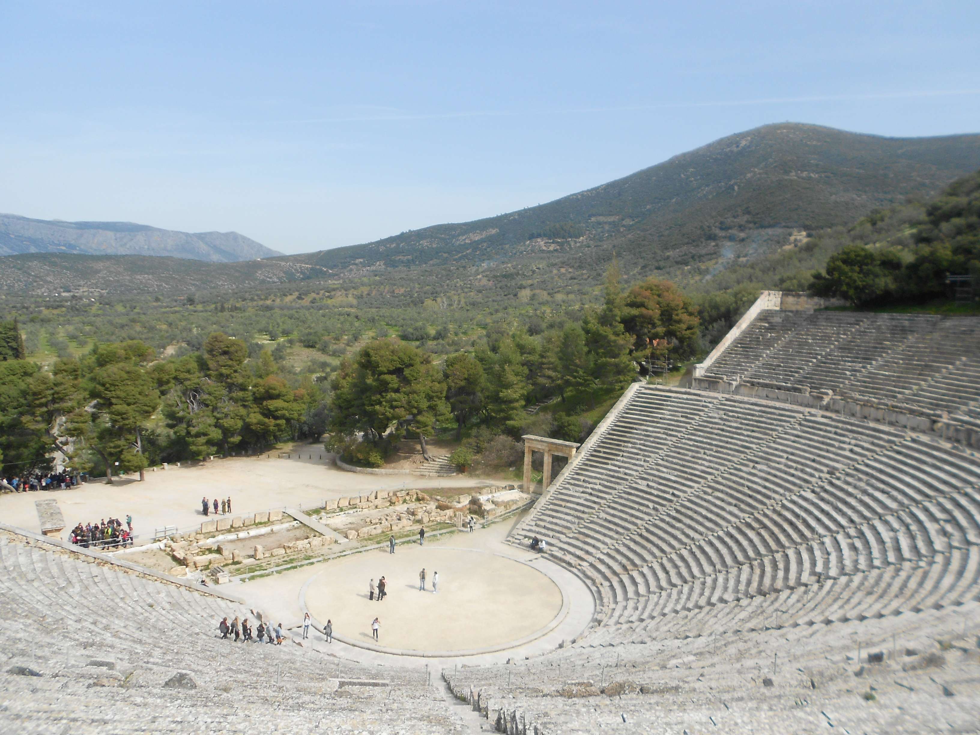 Photographie du théâtre d'Epidaure par temps clair